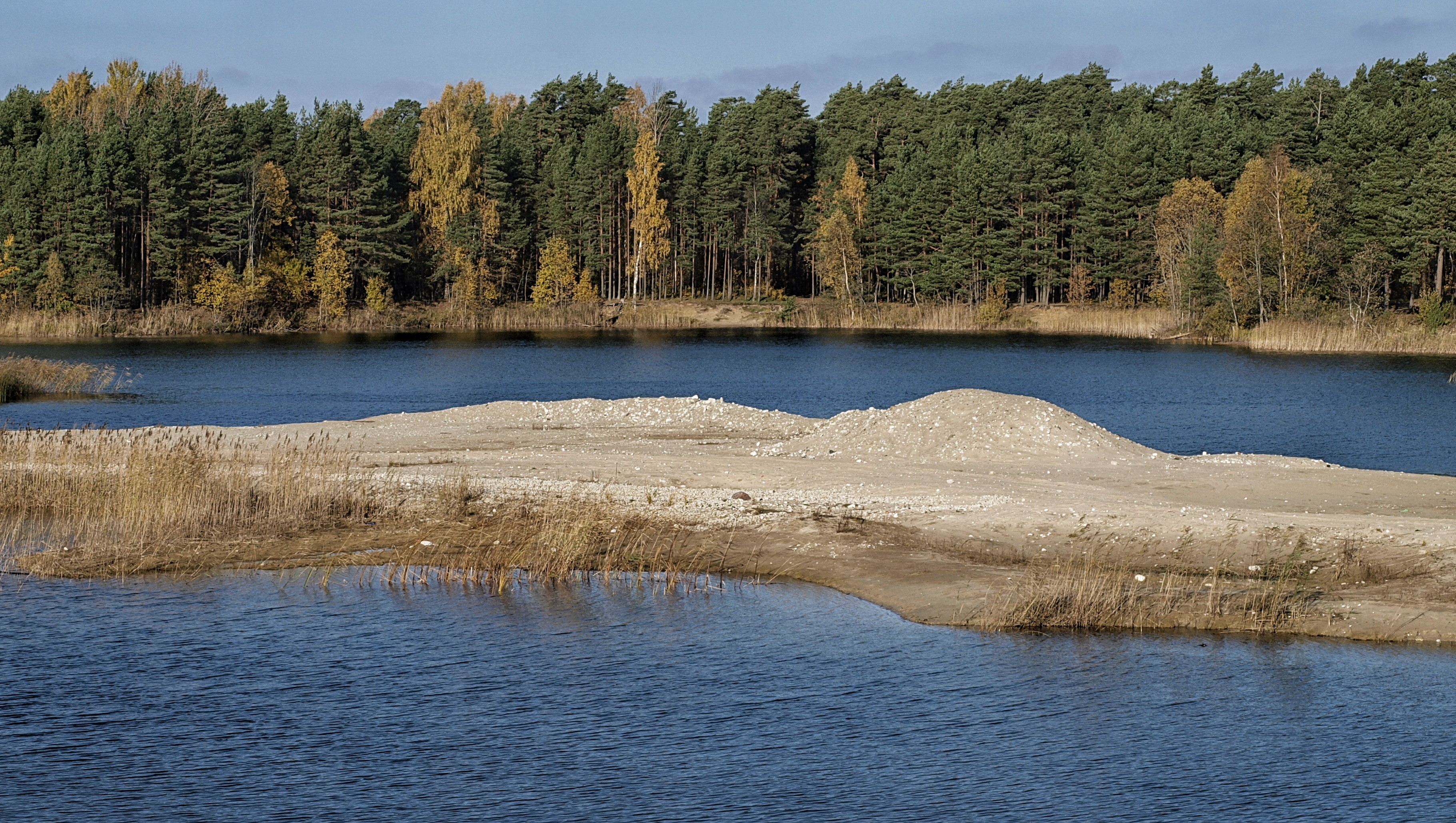 Sügisene vaade. Valgevälja, Ridala vald, Läänemaa